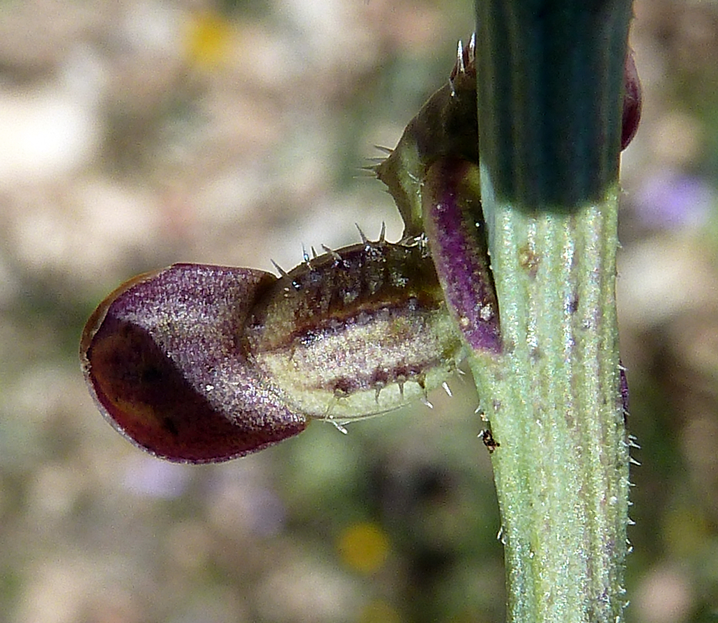 Carrichtera anua (Cucharilla, Mastuerzo valenciano) - Fruto - Colonia Illicitana (Falda meridional de la Sierra de Crevillente), Albatera (Alicante, España).